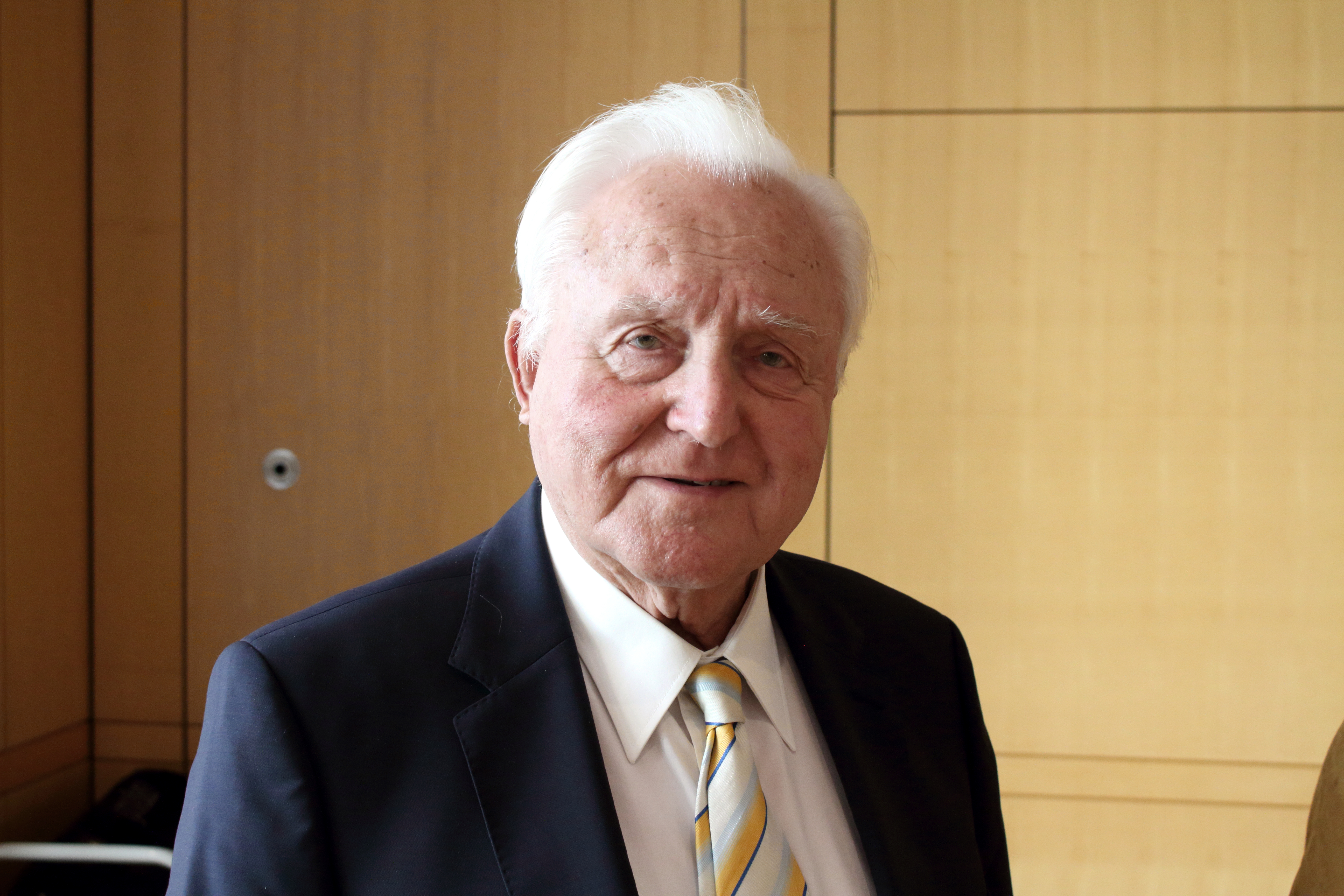 Oscar Schneider, 2015 in der Hanns-Seidl-Stiftung, München